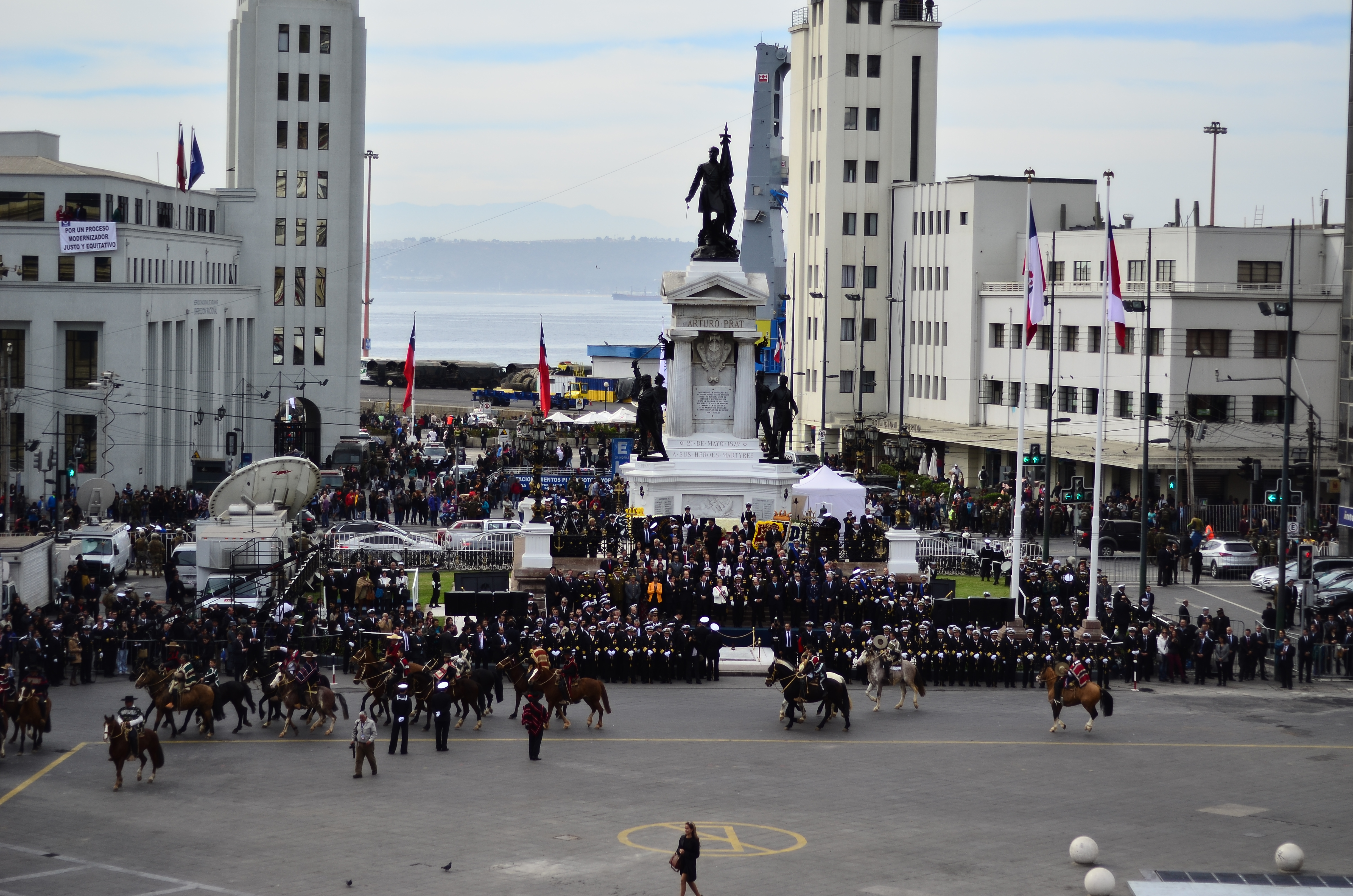 Ceremonia 21 de Mayo